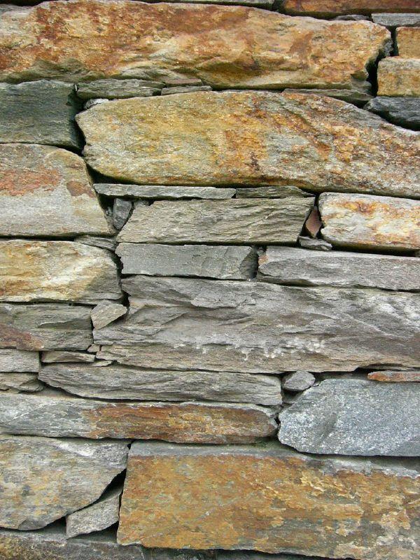 Muralla de Lugo, detalle